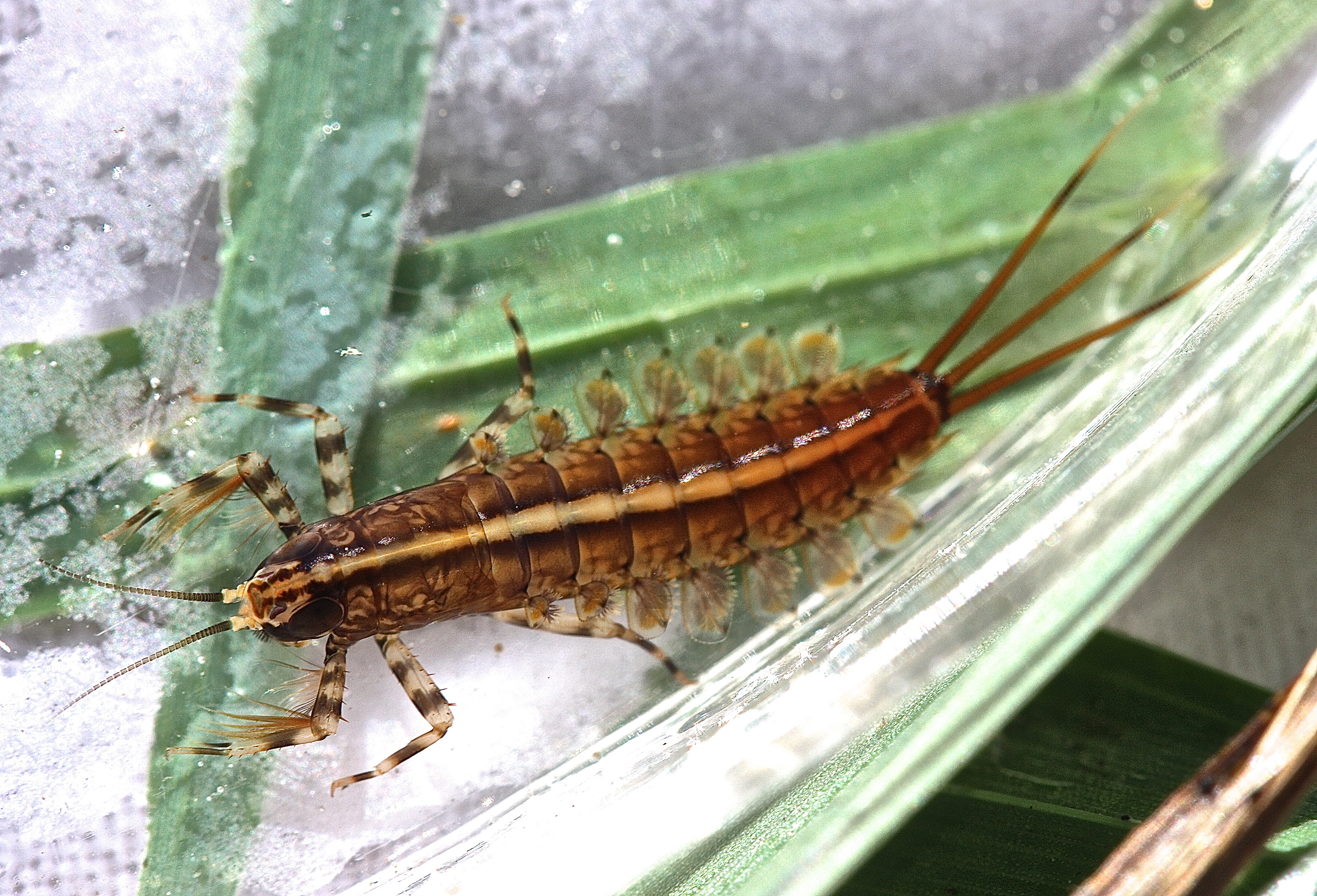 Brushlegged mayfly, genus Isonychia